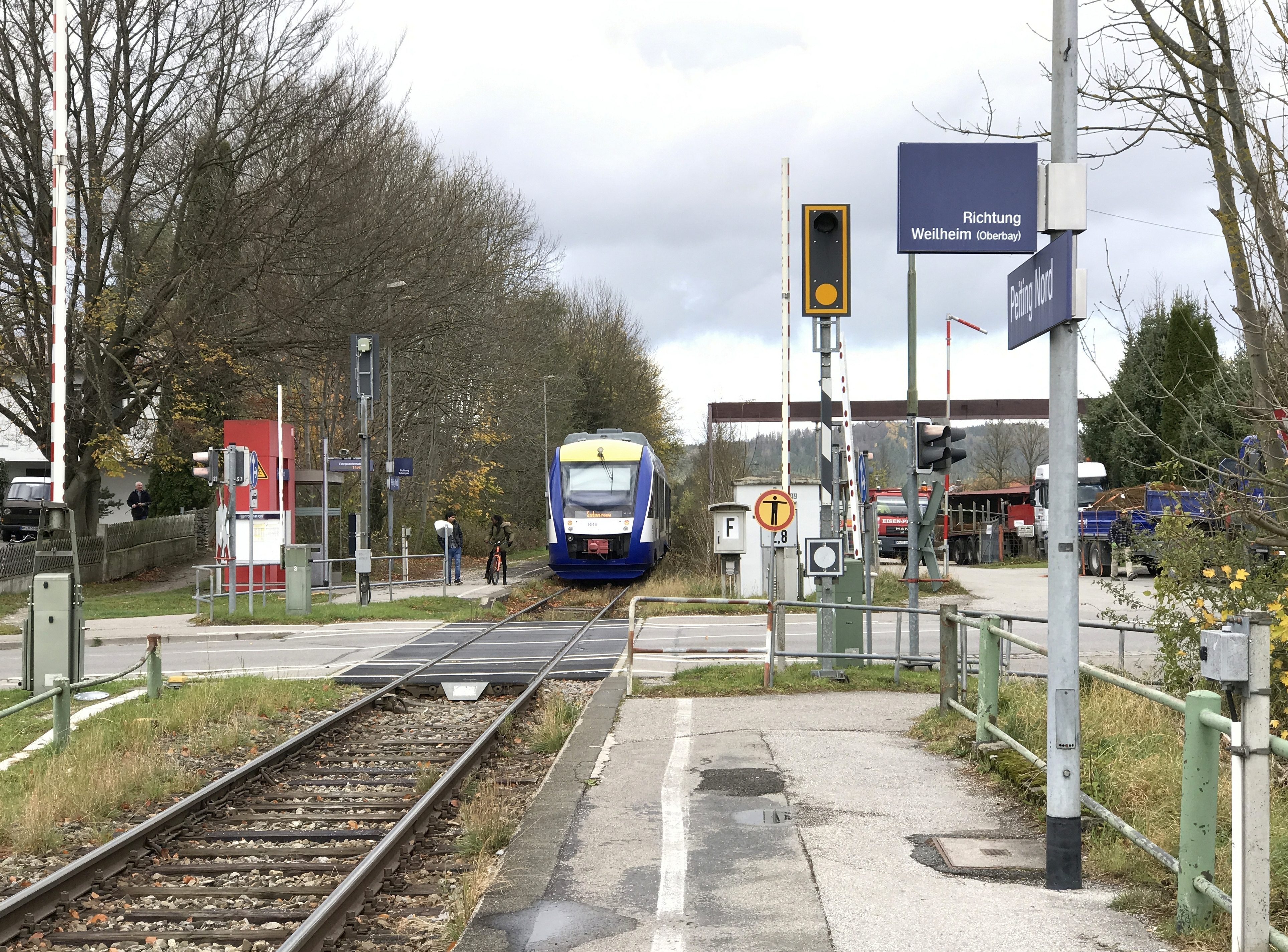 Haltepunkt Peiting-Nord Blick vom Südbahnsteig über den Bahnübergang Münchener Straße zum Nordbahnsteig, dort haltend ein LINT 41 Richtung Schongau, Oktober 2017